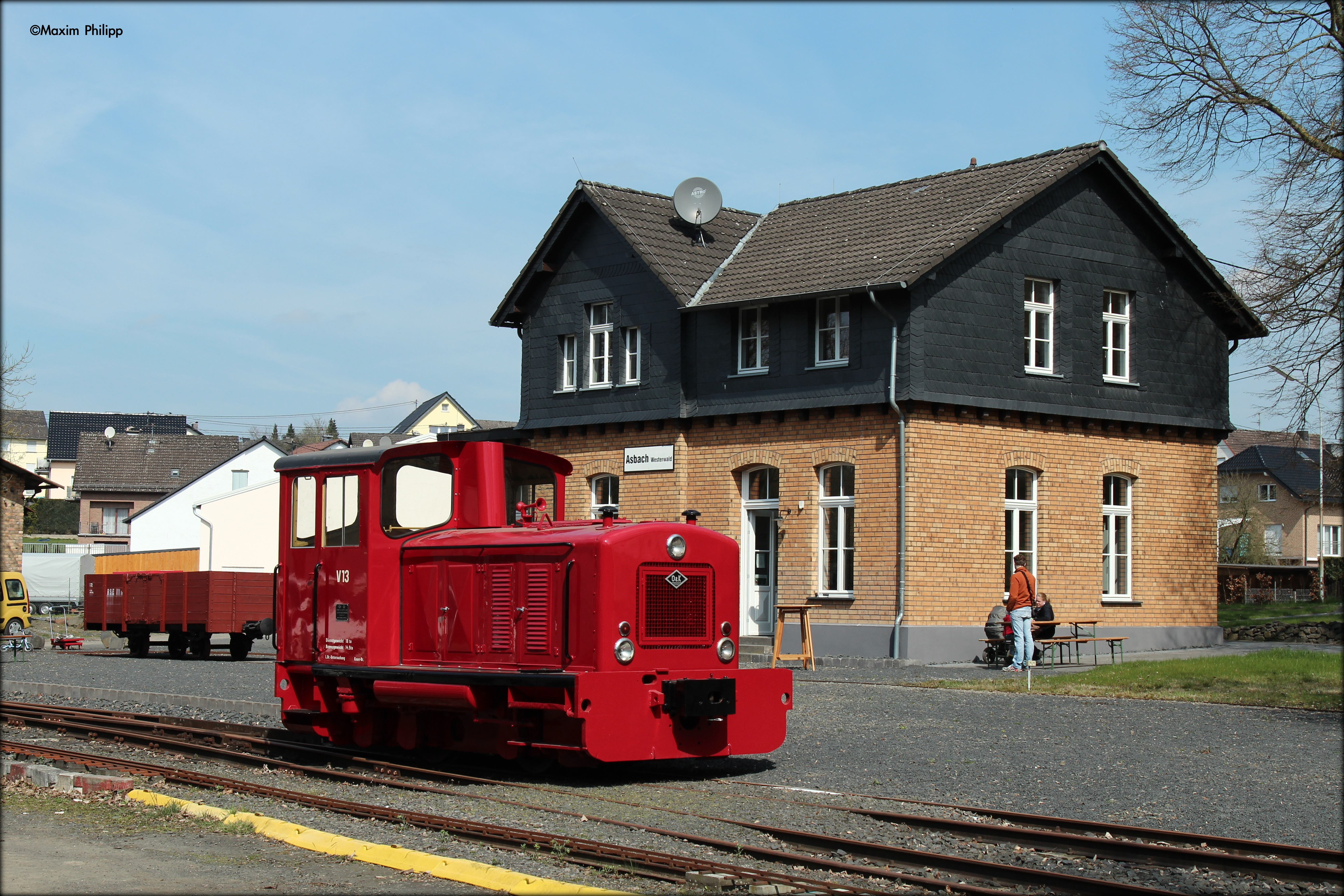 Im Jahre 2013 kehrte die V13, eine O&K Typ MV8, der früheren Rhein-Sieg Eisenbahn AG zurück. Ihre neue Heimat ist nun das RSE-Museum in Asbach (Westerwald).